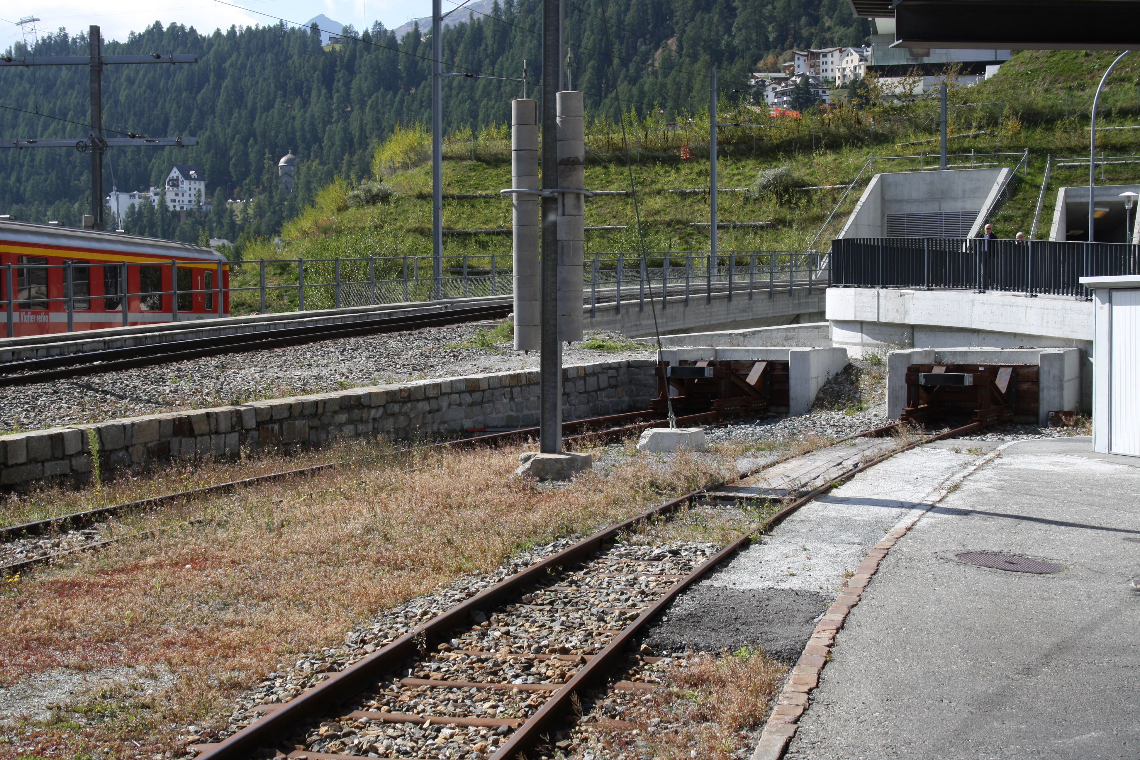 St. Moritz: westlicher Bahnhofskopf vor dem Umbau